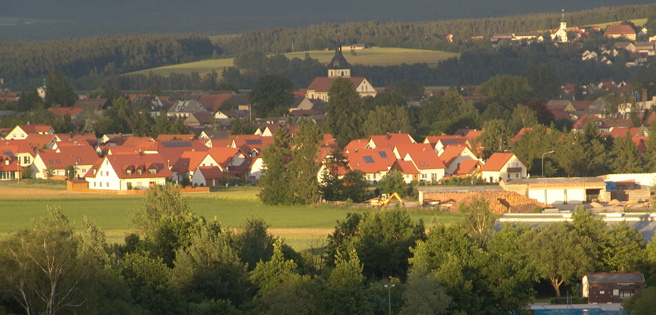 Blick auf den nördlichen und westlichen Teil von Mitterteich aus westlicher Richtung. Zu sehen sind die Wohngebäude eines Neubaugebiets sowie die katholische Stadtpfarrkirche. Im Hintergrund ist der Ort Leonberg mit seiner Kirche zu sehen.